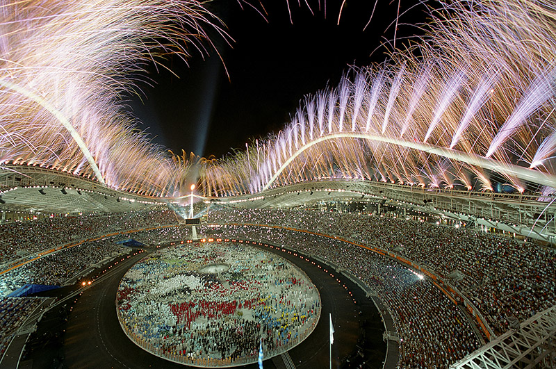 Ouverture des JO d'Athènes, Groupe F, 2004